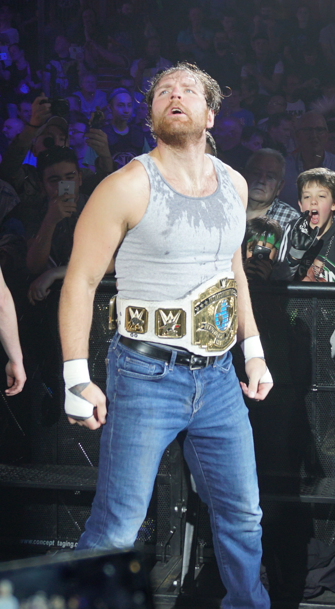 Dean Ambrose (c) defeats The Miz (With Maryse) Info on the match : WWE Intercontinental Title Match ( Le vendredi 12 mai, la WWE Live Tour fera escale au Country Hall a Liege pour le spectacle de catch de l'annee! Au programme: des duels impitoyables et des rencontres captivantes entre les meilleures equipes et les plus grands rivaux. )